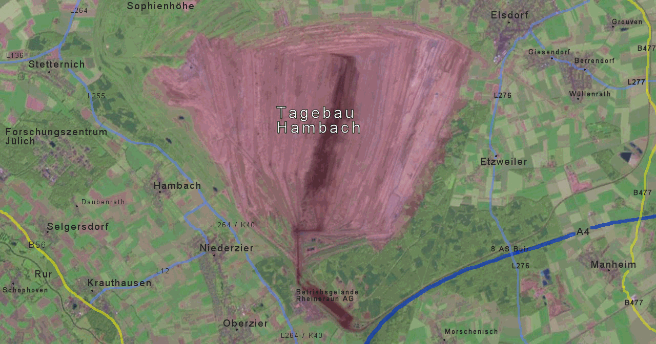 Tagebau Hambach mit umliegenden Ortschaften, Verkehrswegen & Flüssen